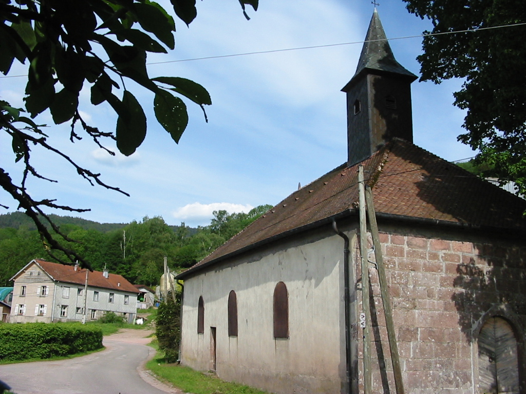 Chapelle Saint-Del Commune de Gerbamont, département des Vosges. Photo personnelle du 7 juin 2006. Copyright © Christian Amet